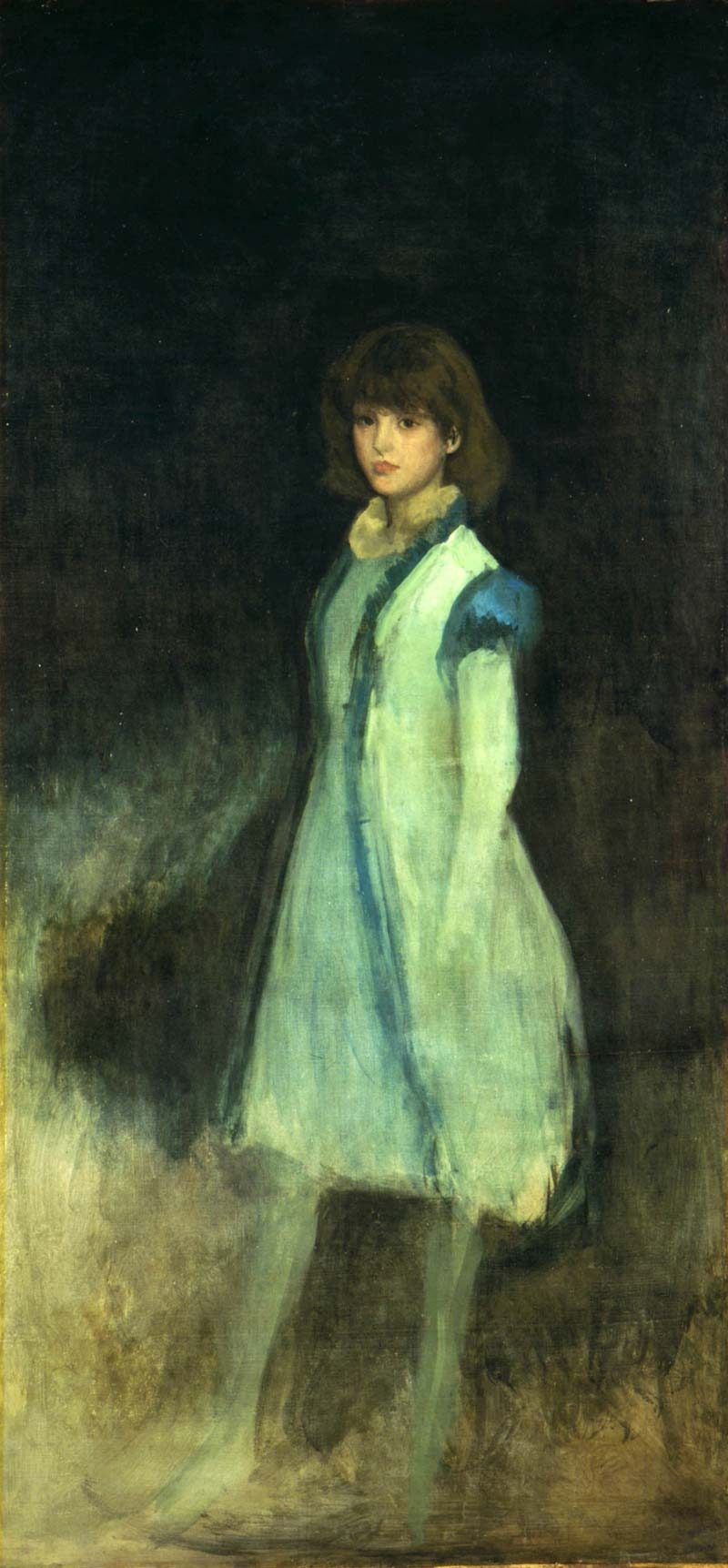 The Blue Girl: Portrait of Connie Gilchrist. c.1879. Оil on canvas. H 188.9 x W 88.6 cm. Accession number GLAHA_46320